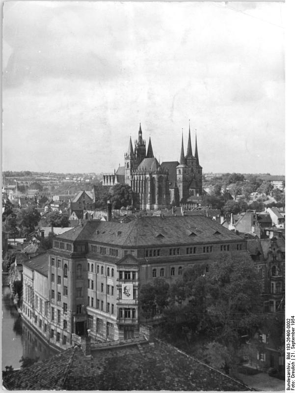 Erfurt, Dom, "Haus der Kultur" Zentralbild TBD-Greulich2455-21.9.1954 2 Motive- Erfurt UBz: Blick auf den Dom und Soverie, im Vordergrund das "Haus der Kultur".